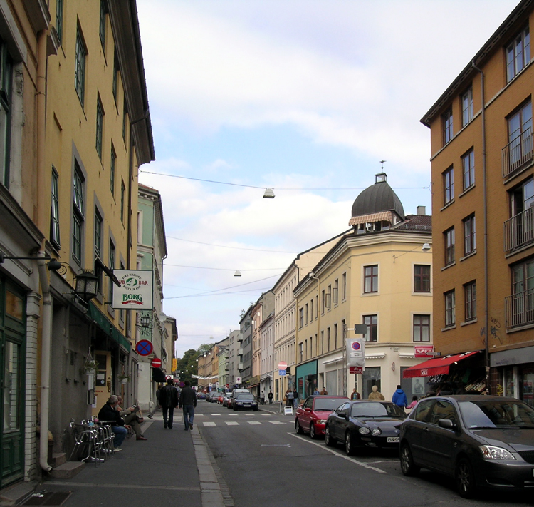 Markveien, Oslo, Norway.